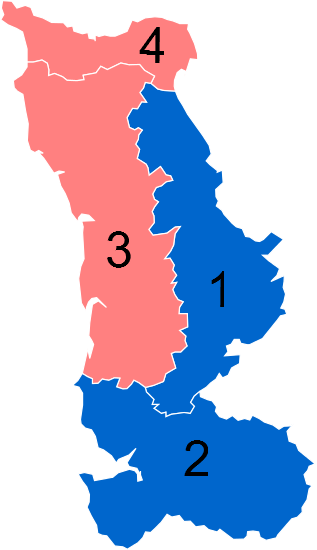 Résultats des élections législatives de la Manche en 2012